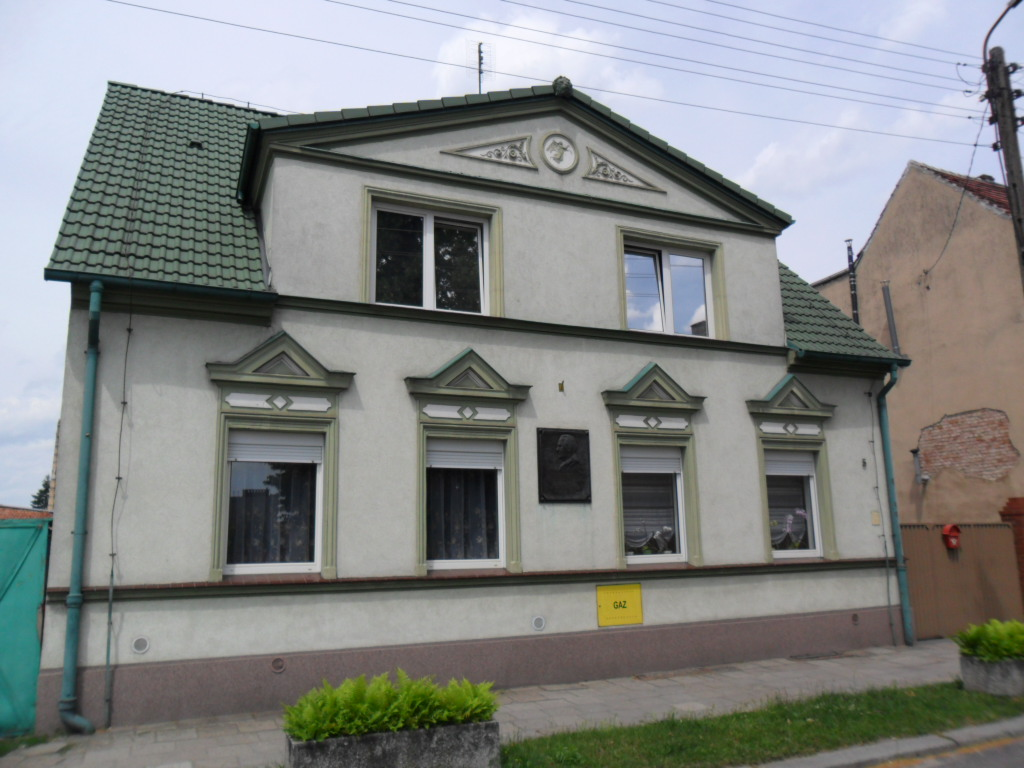 Gubin, ul. Różana 5 - dom w którym mieszkał Wilhelm Pieck